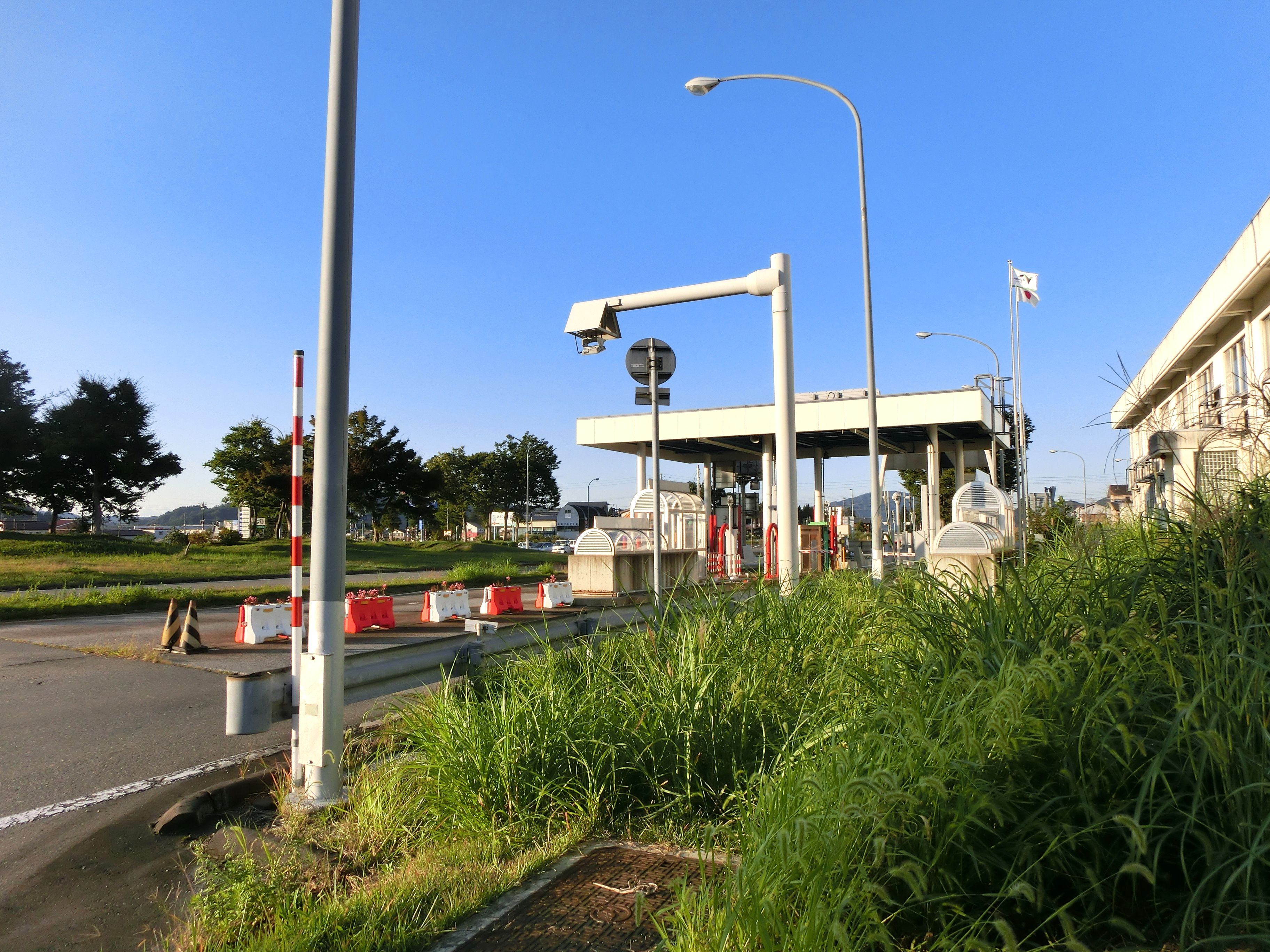 関越自動車道 小出インターチェンジ（料金所付近）